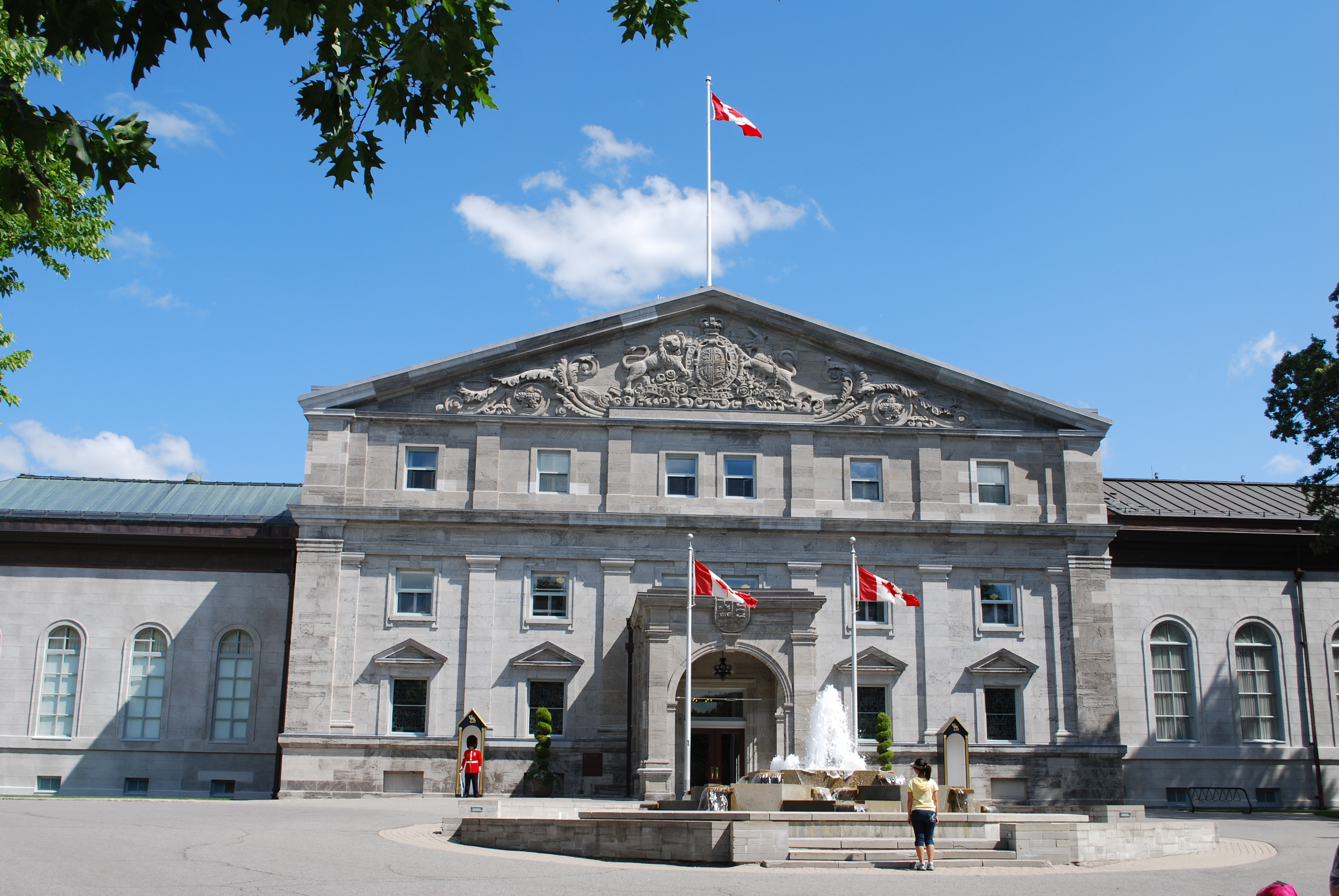 Bâtiment principal du complexe de Rideau Hall